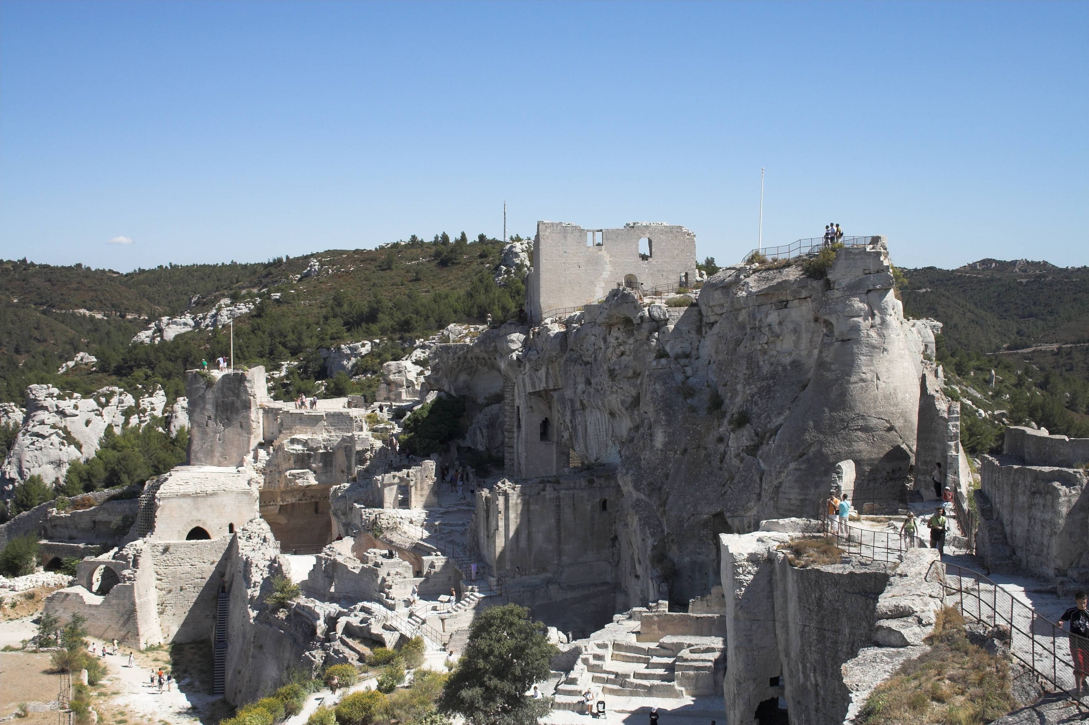 Château des Baux (Les Baux de Provence, France)